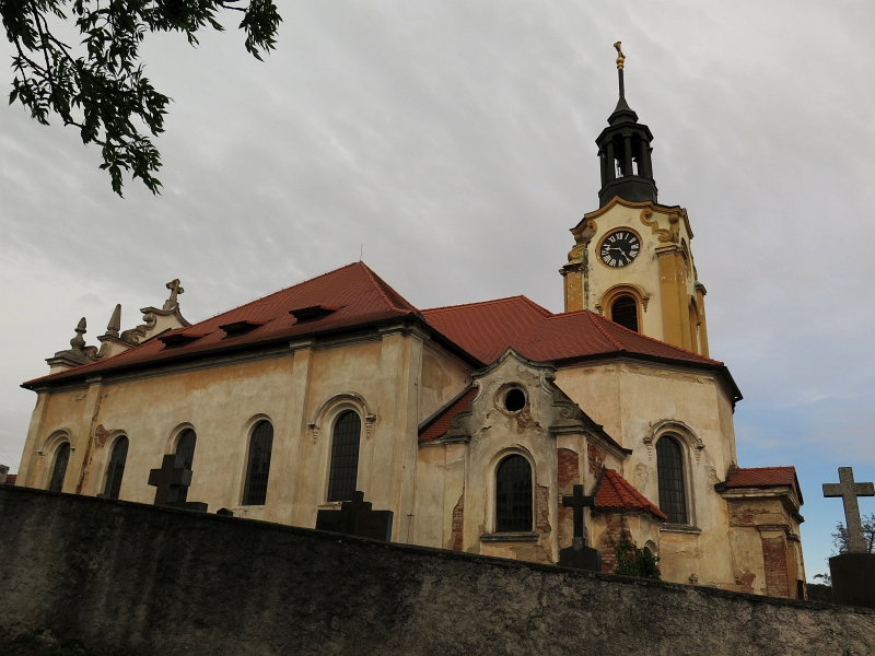 Kostel svatého Jana Křtitele, Vřeskovice.